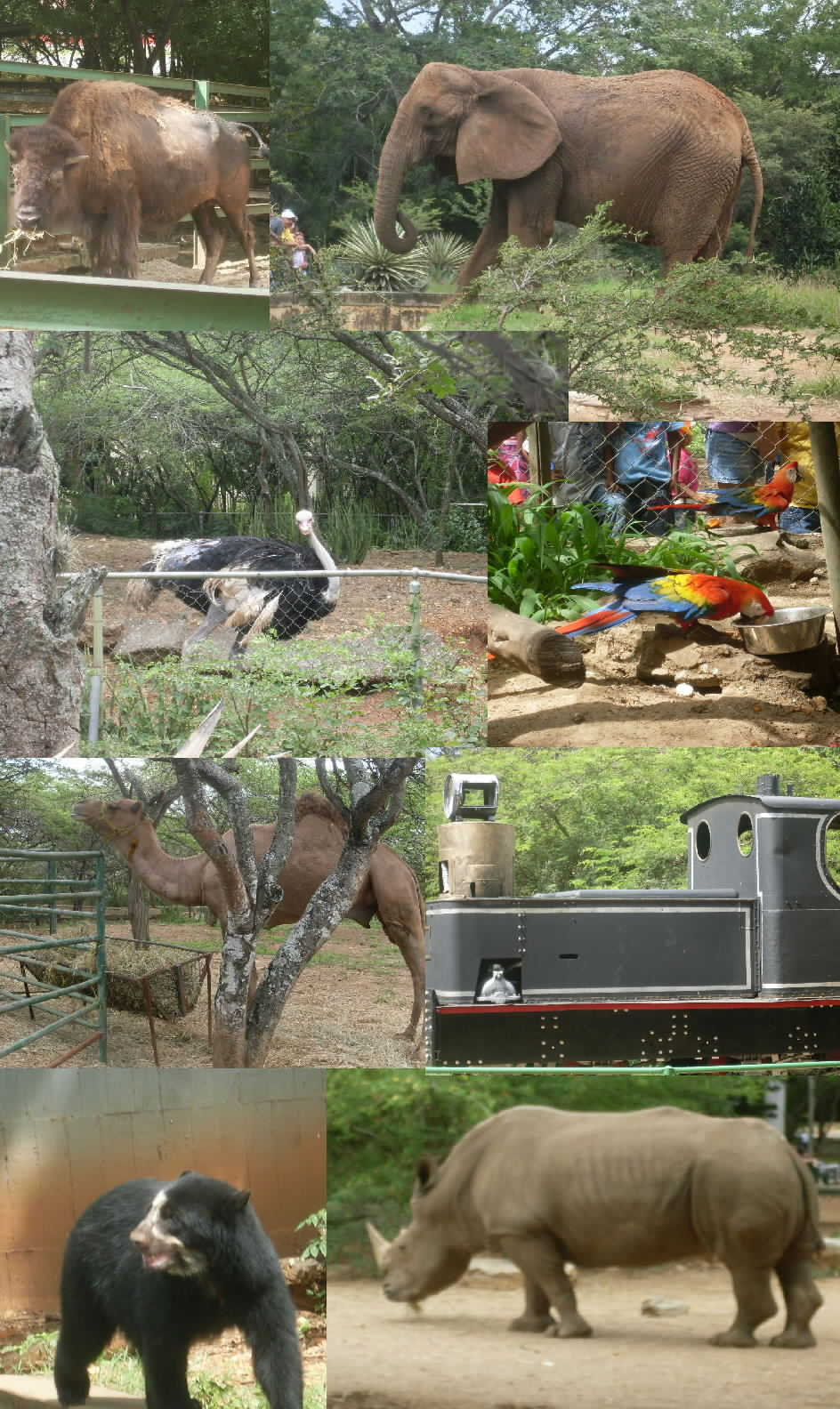 Parque Zoológico y Botánico Bararida, Barquisimeto estado Lara - Venezuela